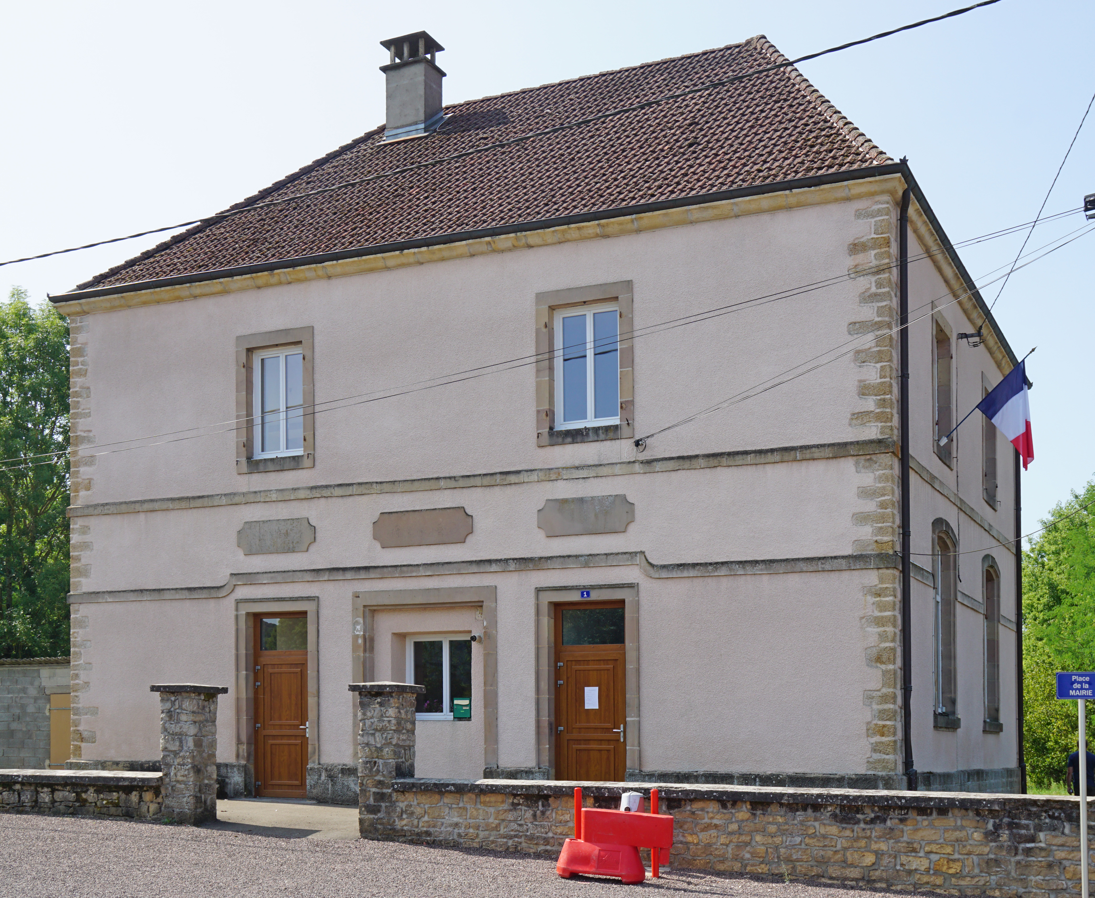 La mairie de Gouhelans.